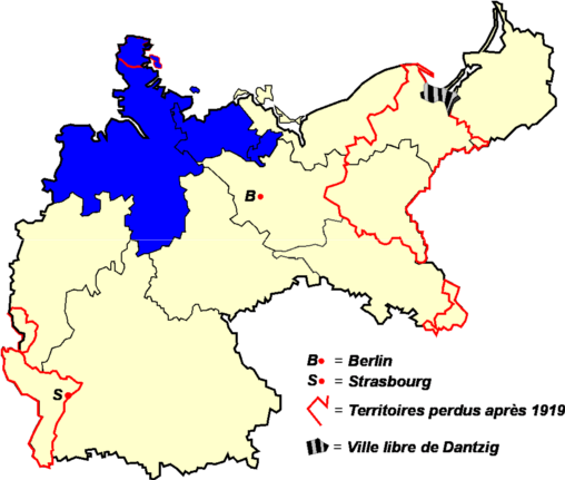 Territoires couverts par la Fédération de football d'Allemagne du Nord (NSV) de 1905 à 1933 Catégorie:Logo Fédérations Allemandes de Football